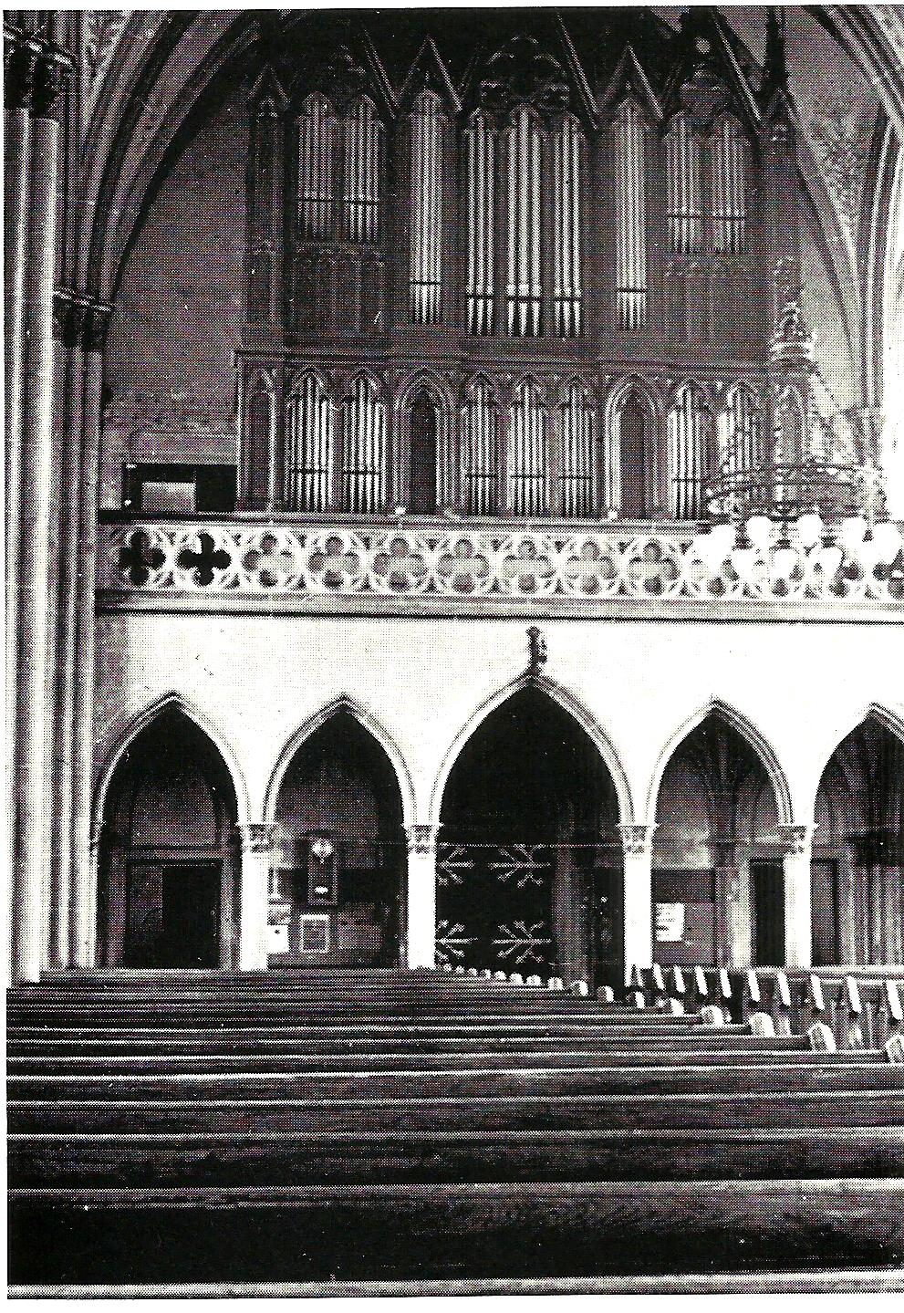 Diese Orgel stand von 1861 bis 1967 in der Stadtkirche.